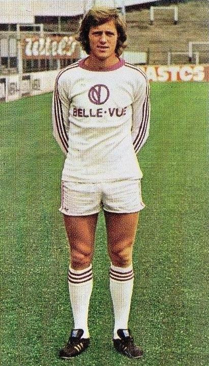 Arrivée d'Arie Haan en 1975 au RC Anderlecht, 'Belgio-Football 76', Panini figurina n°17.